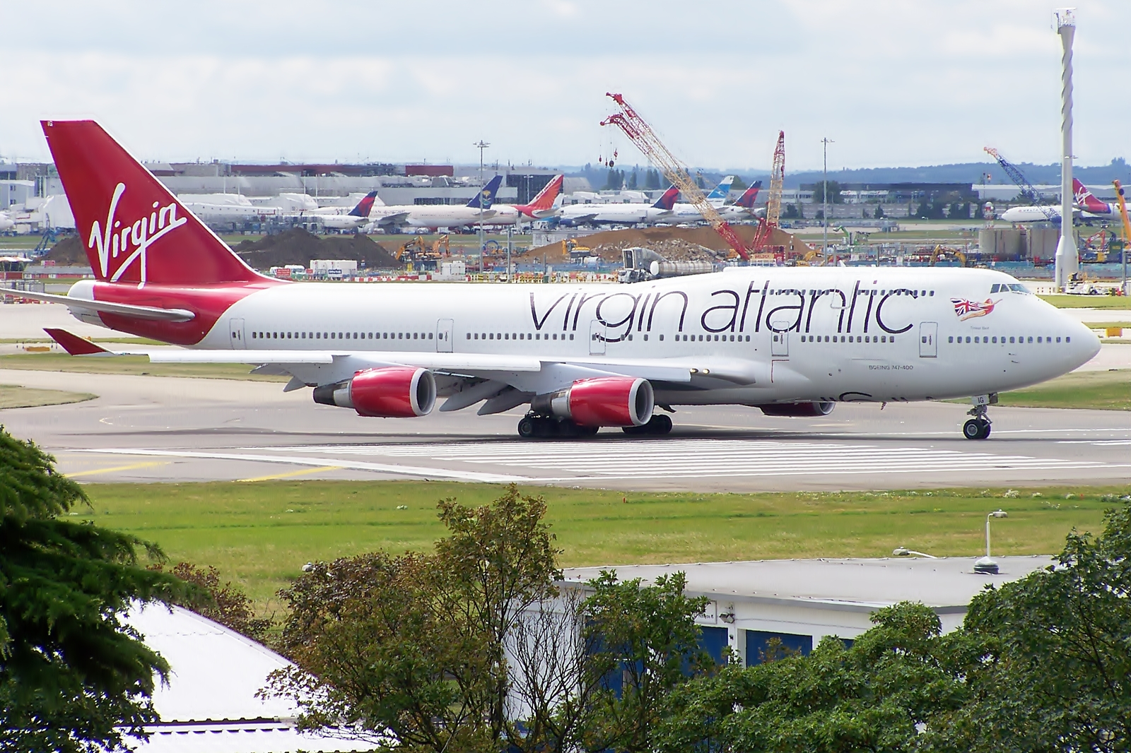 G-VBIG Boeing 747-400 Virgin Atlantic